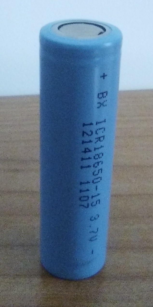 Celdas de batería 18650